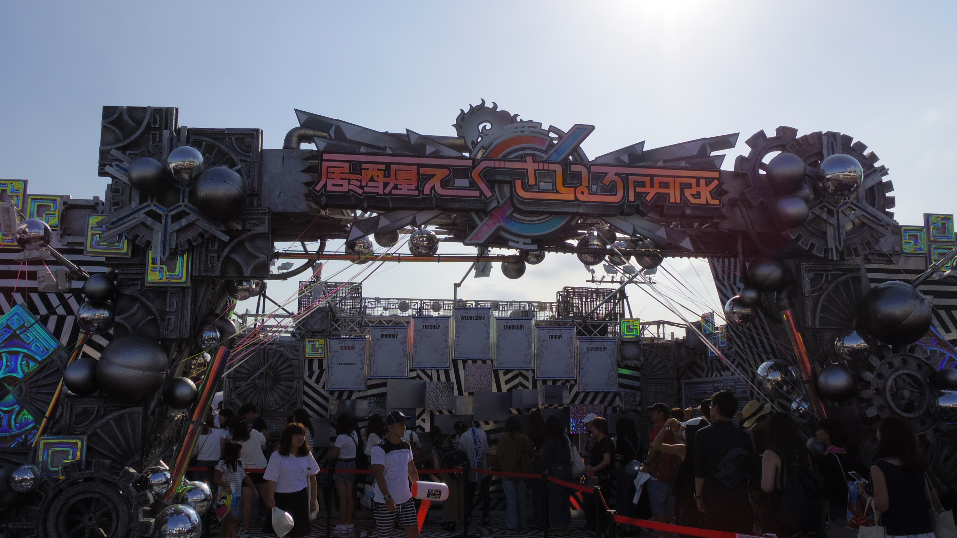 「お台場みんなの夢大陸2017・スマイルランド」より。恒例となった「居酒屋えぐざいるPARK」に並ぶ人々。2017年8月27日撮影。